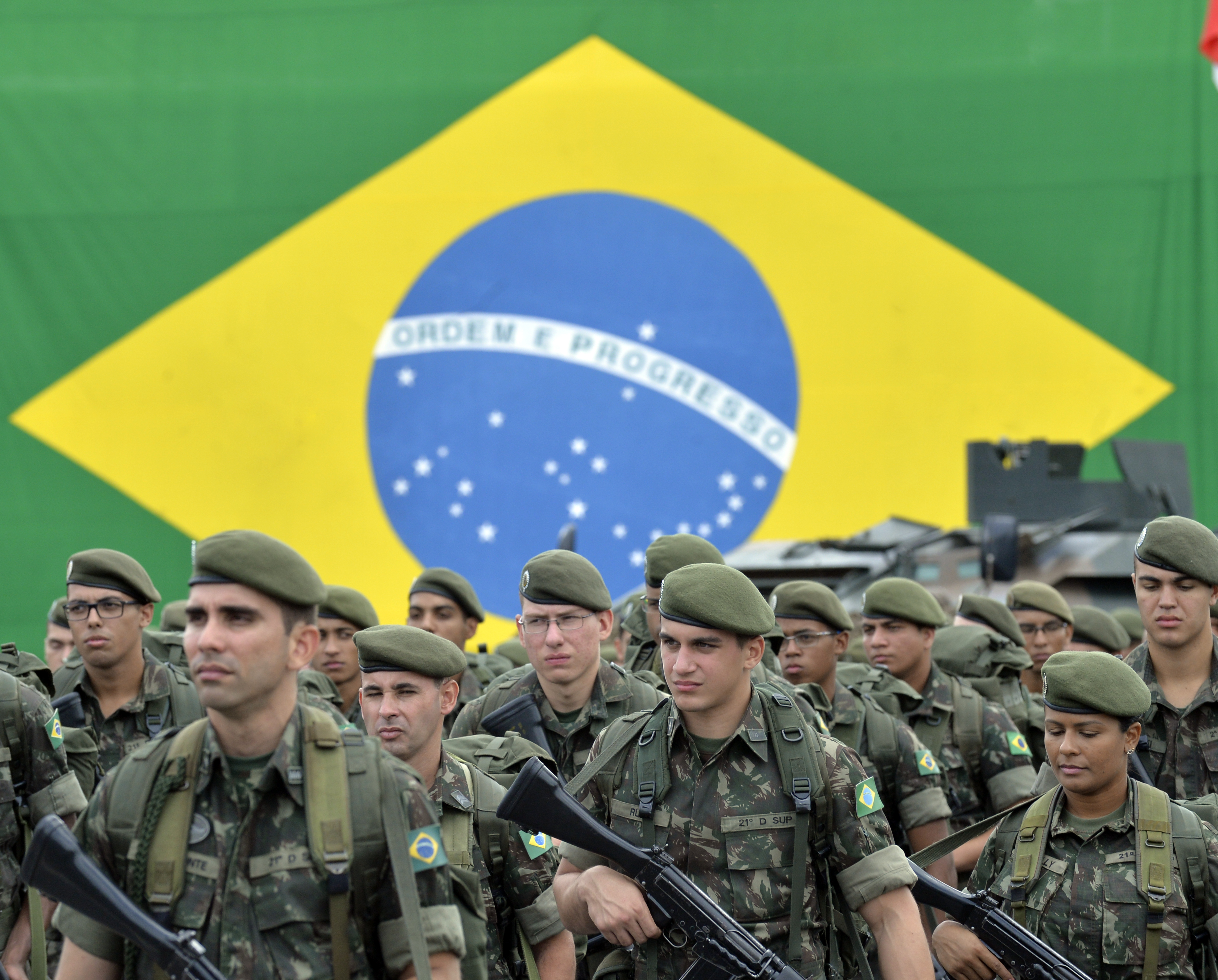 22/01/2016, São Paulo - SP Fotos: Gilberto Alves